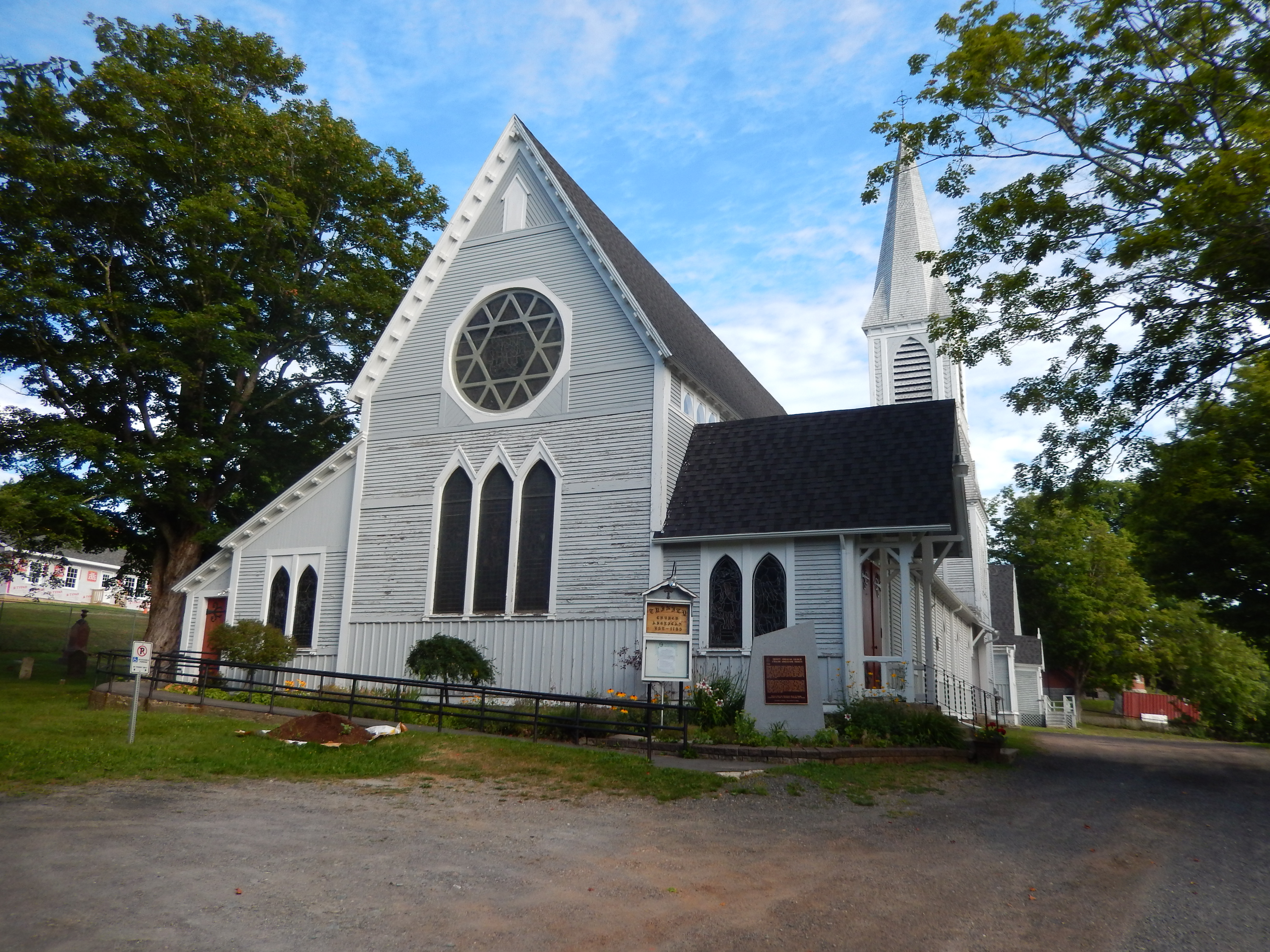 église Trinity à Digby (Nouvelle-Écosse).